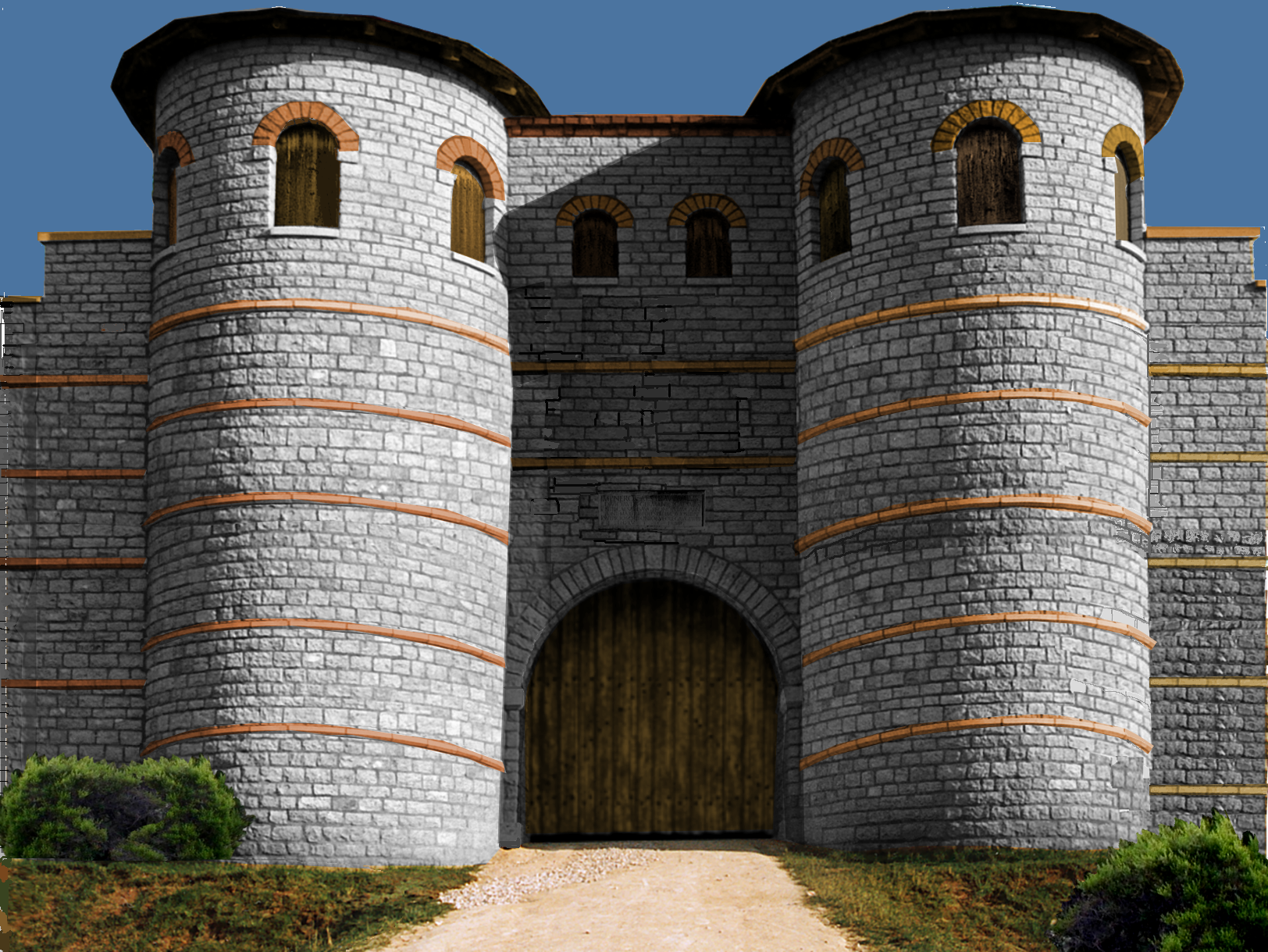 Rekonstruktionsversuch des Osttores von Kastell Portus Lemanis an der Sachsenküste (GB), Zustand im 3. Jahrhundert n.Chr.